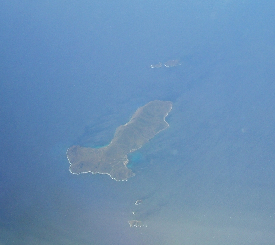 Illes de la Galite i Galitons